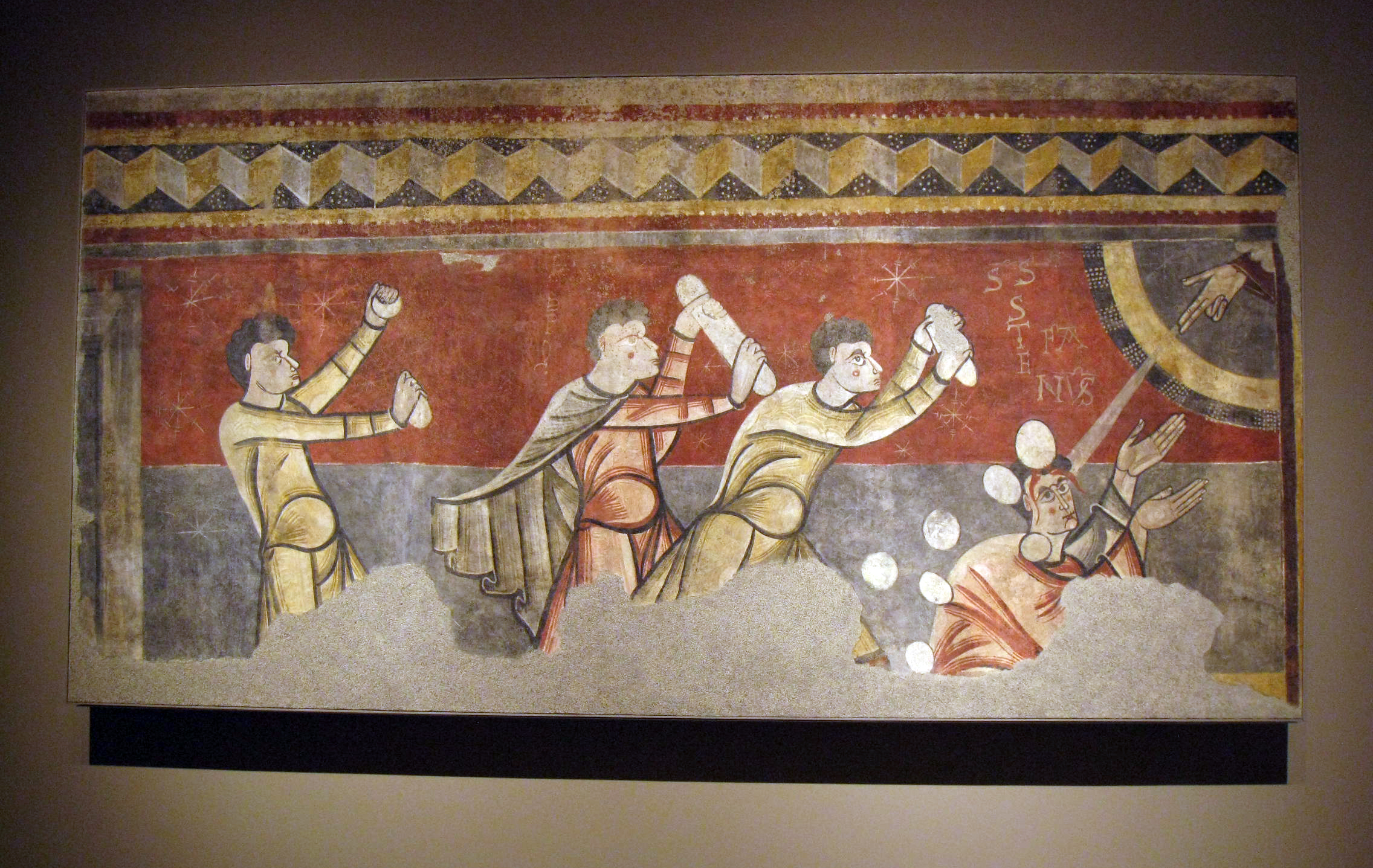 Palau Nacional (Barcelona)